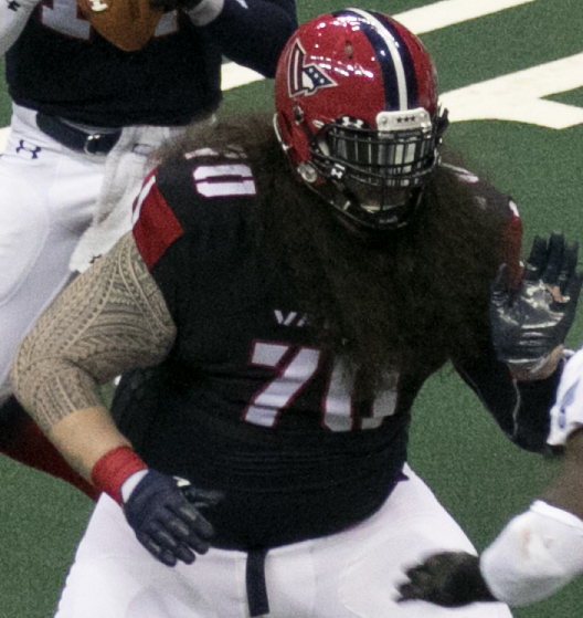 Valor 47 / Philadelphia Soul 48